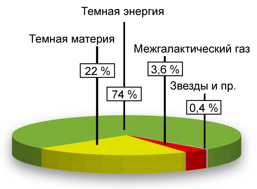 Диаграмма распределения массы во Вселенной